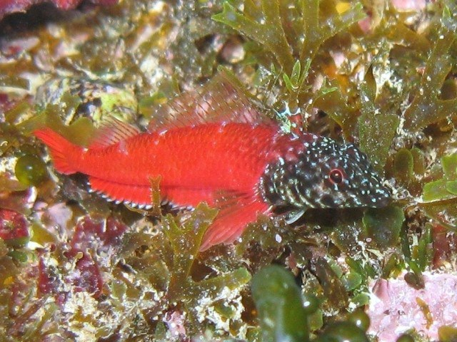 Tripterygion melanurus, Croatia, Krk